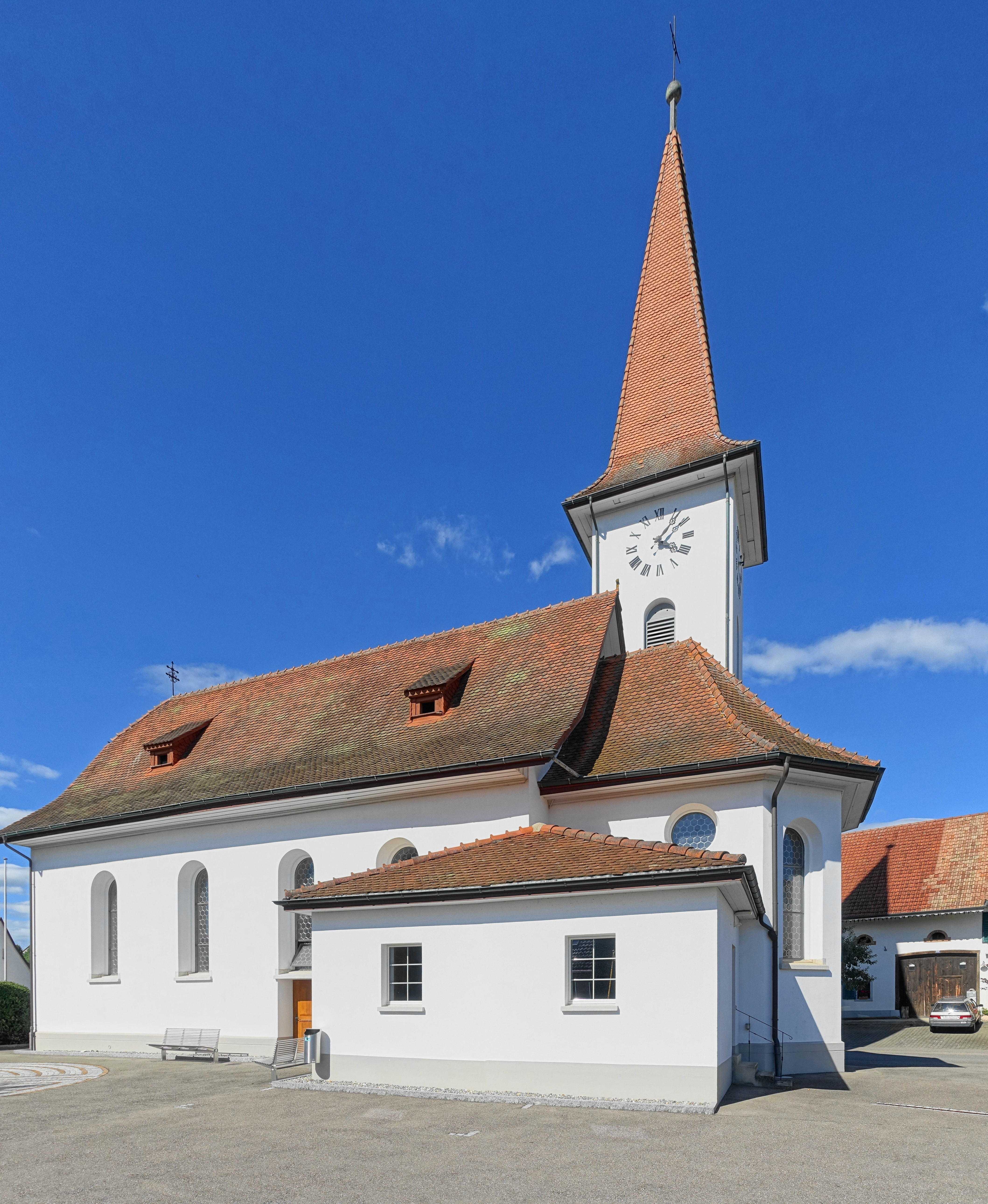 Kirche St. Kosmas & Damian